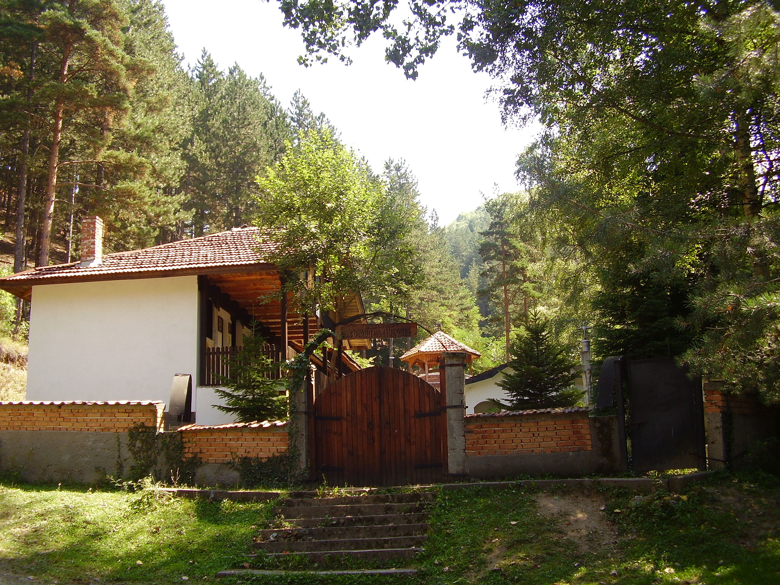 Манастир "Св.Архангел Михаил"-с.Сапарево, общ.Сапарева баня